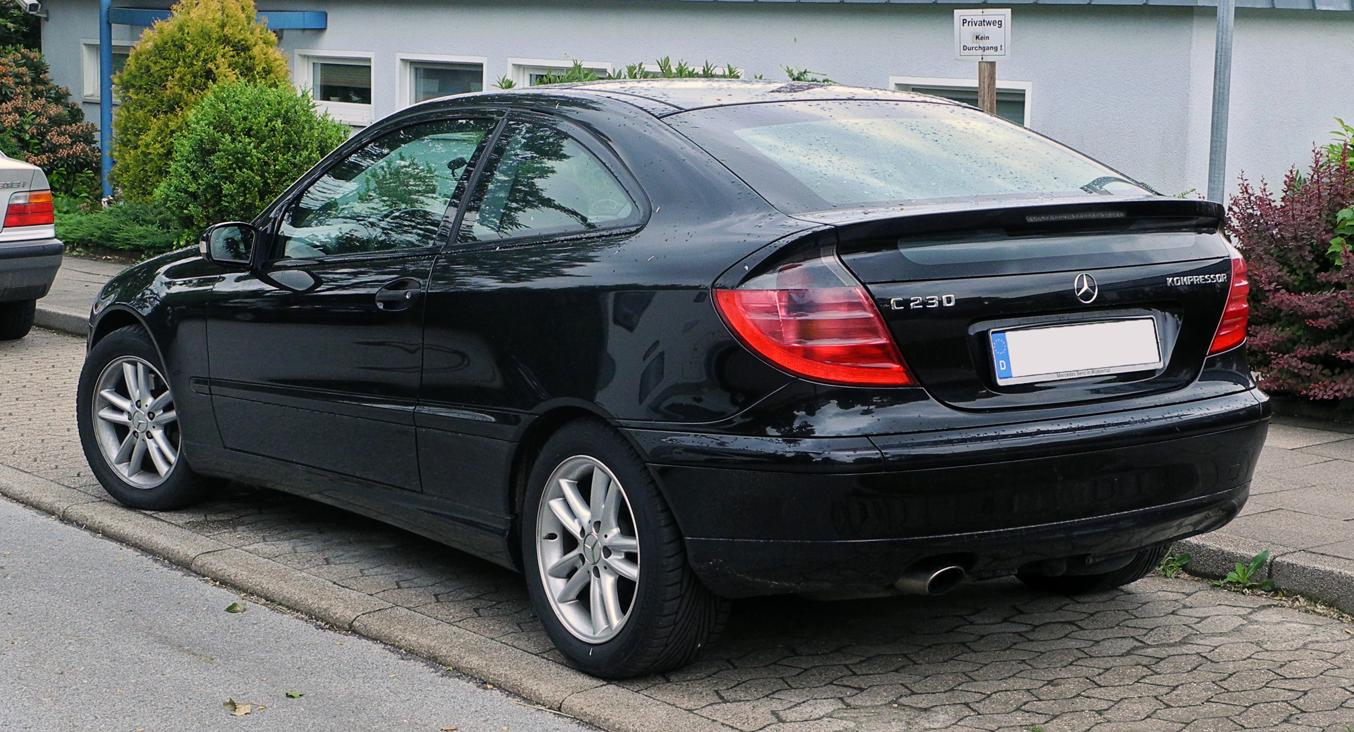 Mercedes-Benz C 230 Kompressor Sportcoupé (CL 203)